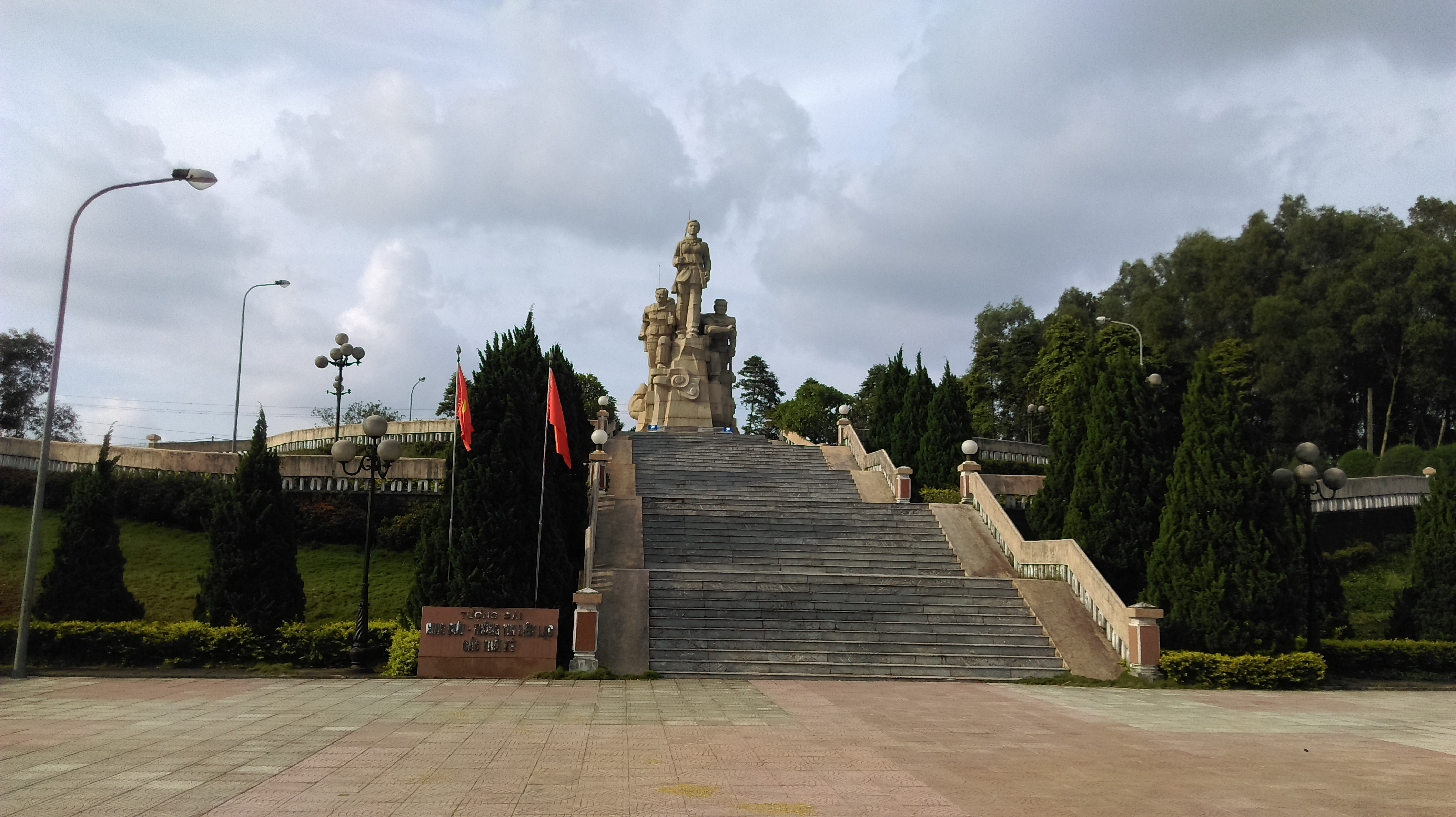 Tượng đài Giao bưu, Gio Phong, Gio Linh, Quảng Trị